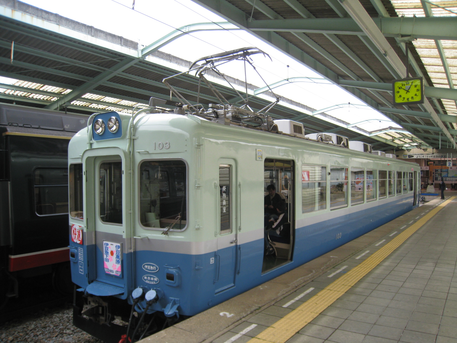 2012年4月3日、「快速100系さくら号」として運転中の姿。